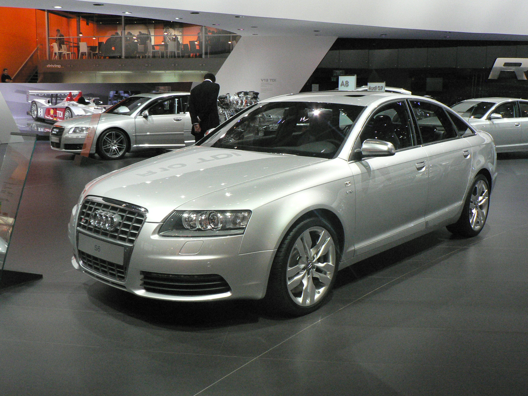 Mondial de l'automobile, Paris 2006